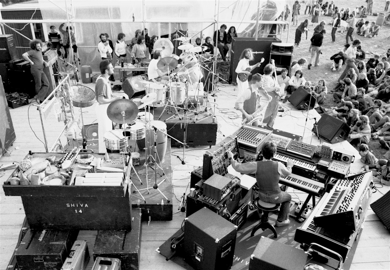 Shivananda live Abtwil Switzerland on Tour 1979